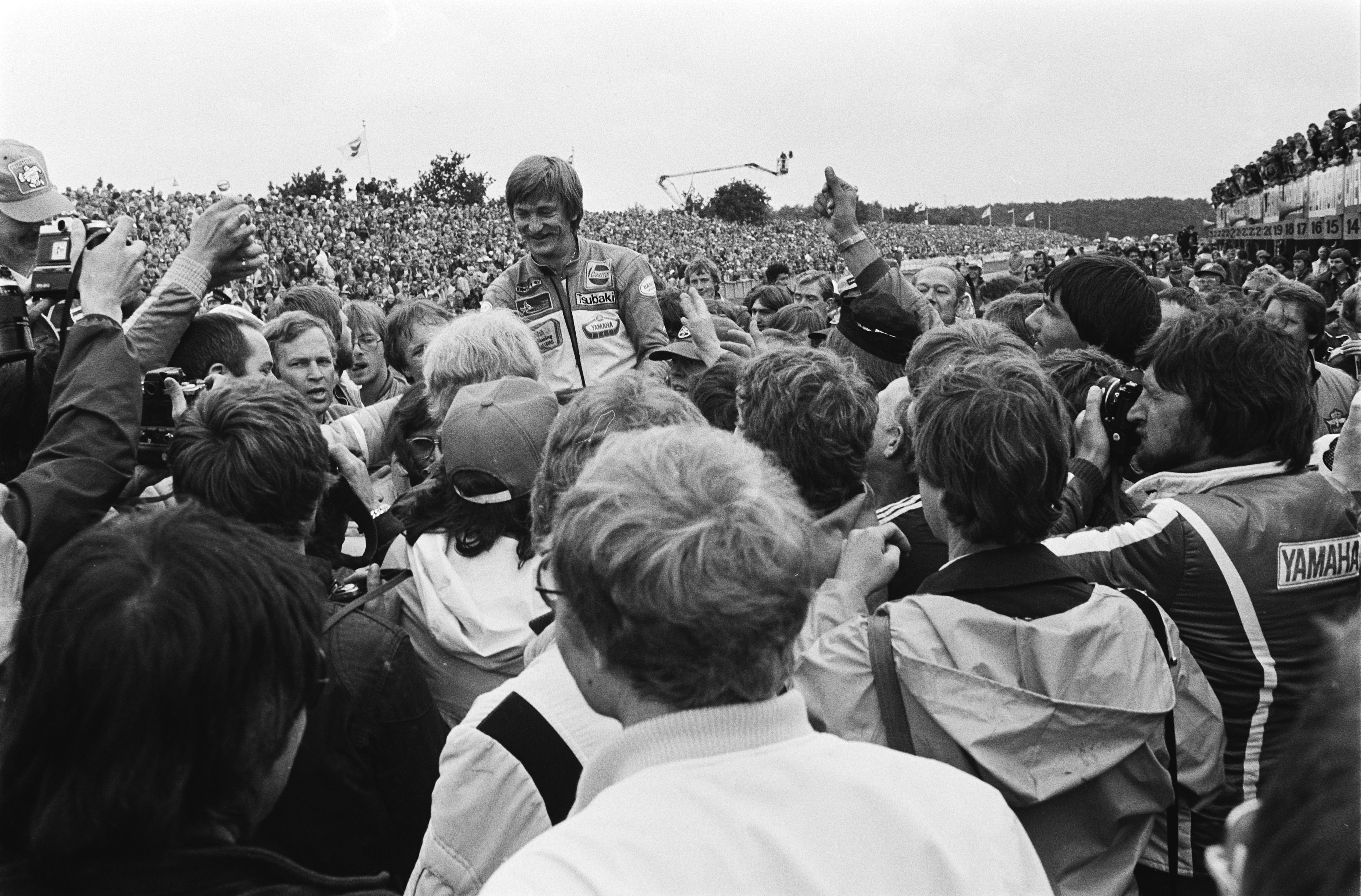 Collectie / Archief : Fotocollectie Anefo Reportage / Serie : TT Assen 1980 Beschrijving : TT Assen ; Jack Middelburg (winnaar 500 CC ) op de schouders Datum : 28 juni 1980 Locatie : Assen Trefwoorden : motorcoureurs, motorraces, motorsport, sport Persoonsnaam : Middelburg, Jack Fotograaf : Pereira, Fernando / Anefo Auteursrechthebbende : Nationaal Archief Materiaalsoort : Negatief (zwart/wit) Nummer archiefinventaris : bekijk toegang 2.24.01.05 Bestanddeelnummer : 930-9037